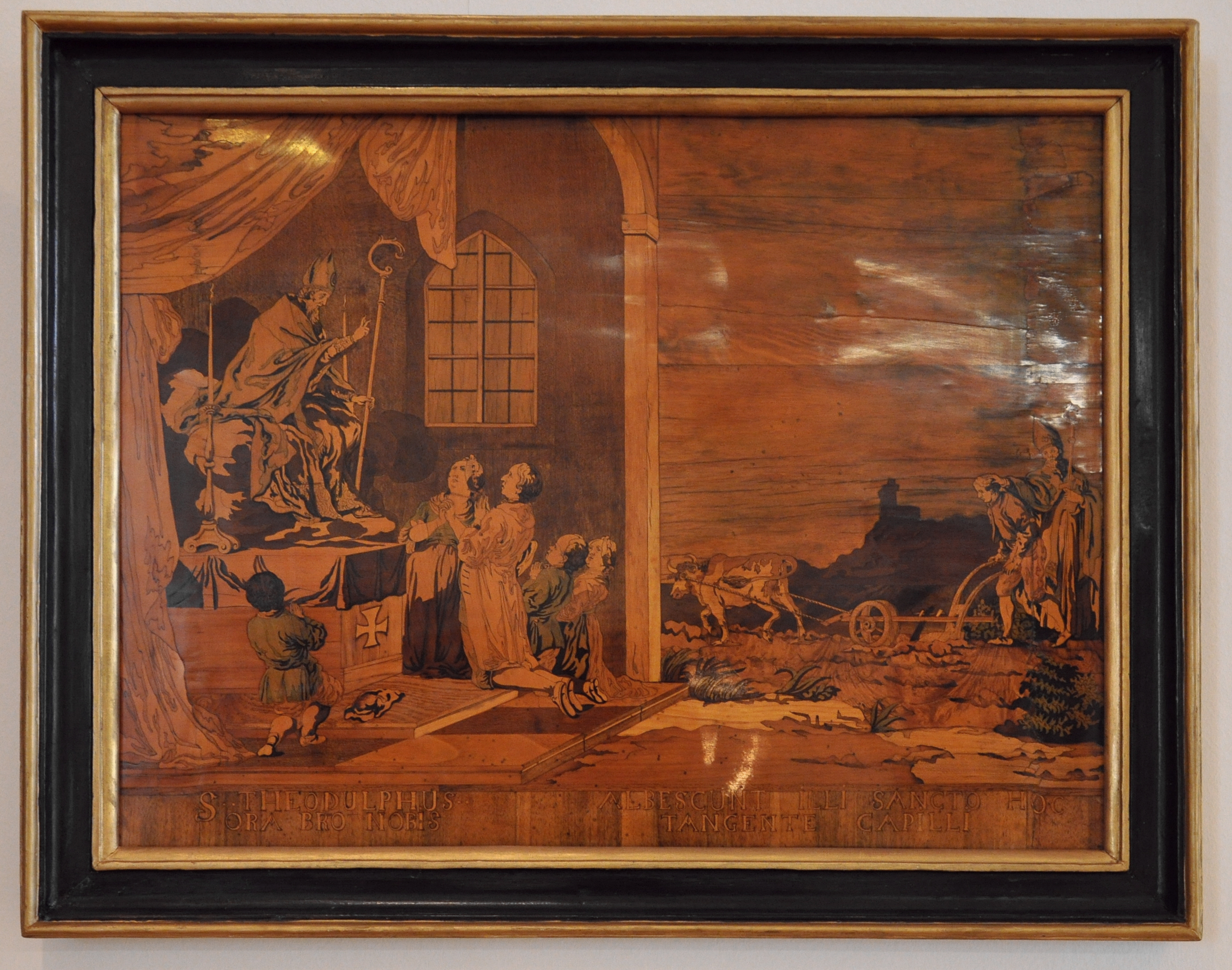 Intarsienbild, Werkstatt David Roentgen, Ausführung Michael Rummer, nach Entwurf von Januarius Zick; Motiv: links Verehrung des hl. Theodulf von Trier, rechts Landschaft mit pflügendem Bauern und hl. Theodulf; Neuwied, um 1776; Naedlholztafel mit verschieden gefärbten Hölzern in Mosaikeinlegetechnik; Museum für Angewandte Kunst Frankfurt am Main, Inv. Nr. 6889